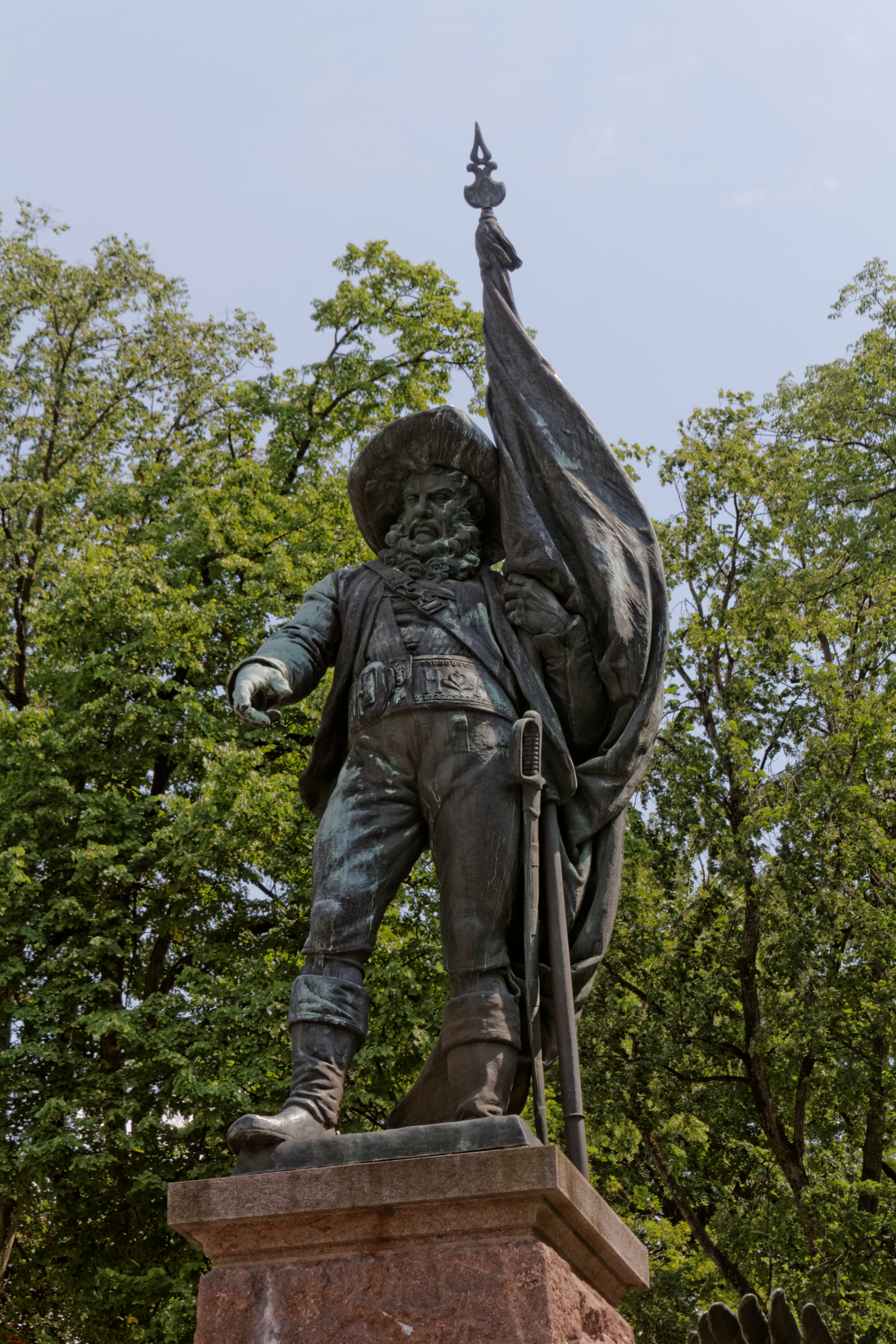 Andreas-Hofer Denkmal, Berg Isel, Insbruck